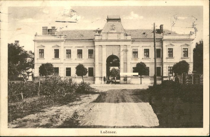 Infanterie-Kaserne in Losoncz/Lucenec